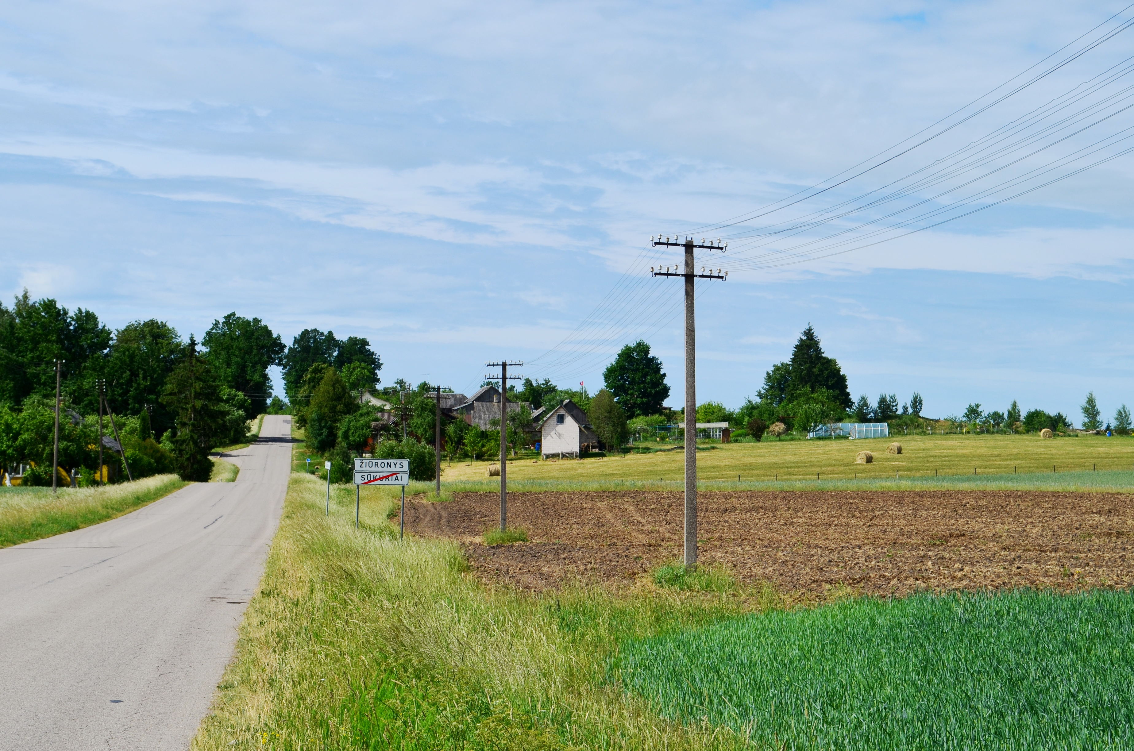 Žiūronys, Prienų raj.